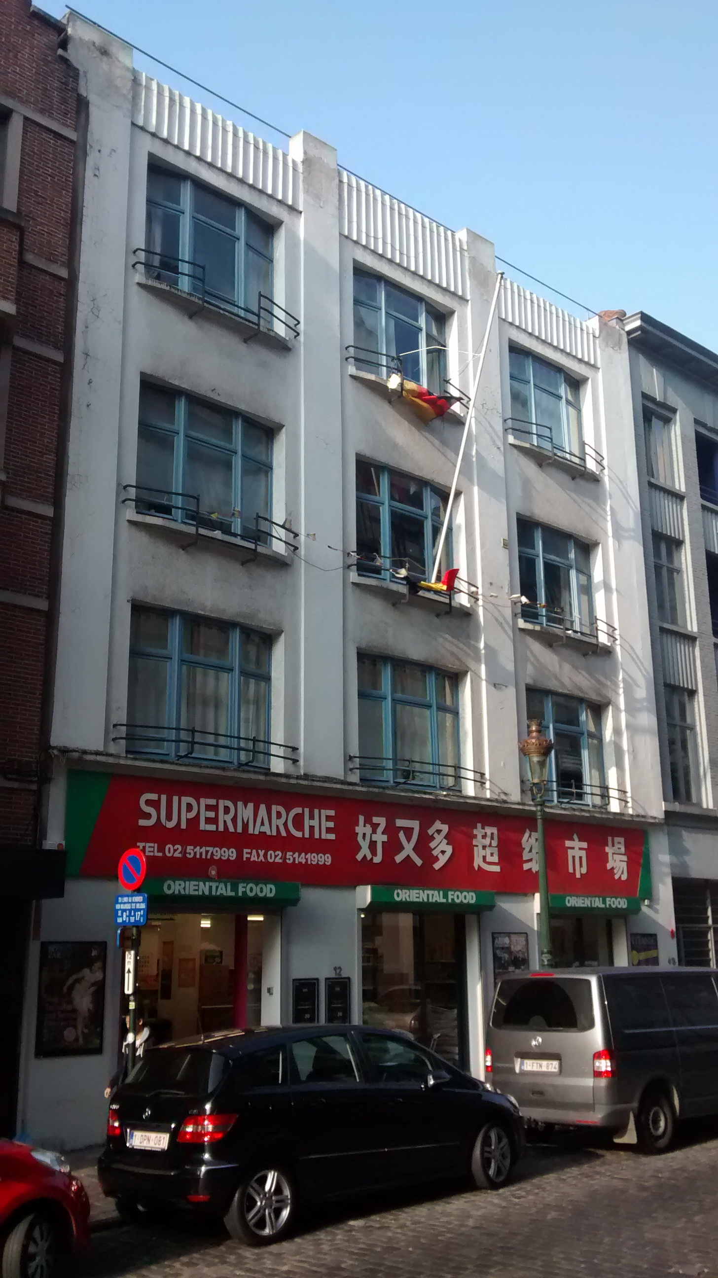 "Voormalige winkel Sarma en traditioneel achterhuis." Sint-Katelijnestraat 12-14, Brussel. Eerste winkel van de SARMA-keten (société anonyme pour la revente d'articles de masse, geopend in 1928. Achter deze gevel is een volledig achterhuis uit de 17de eeuw verborgen. Het geheel is beschermd sinds 1994. De benedenverdieping is nu een Chinese supermarkt, de bovenverdiepingen worden ingenomen door studentenkoten.